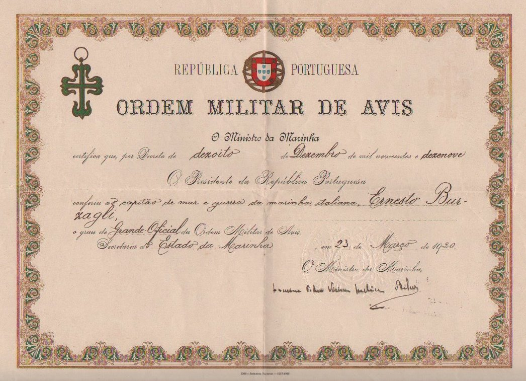 Premiu pentru cel mai bun portret